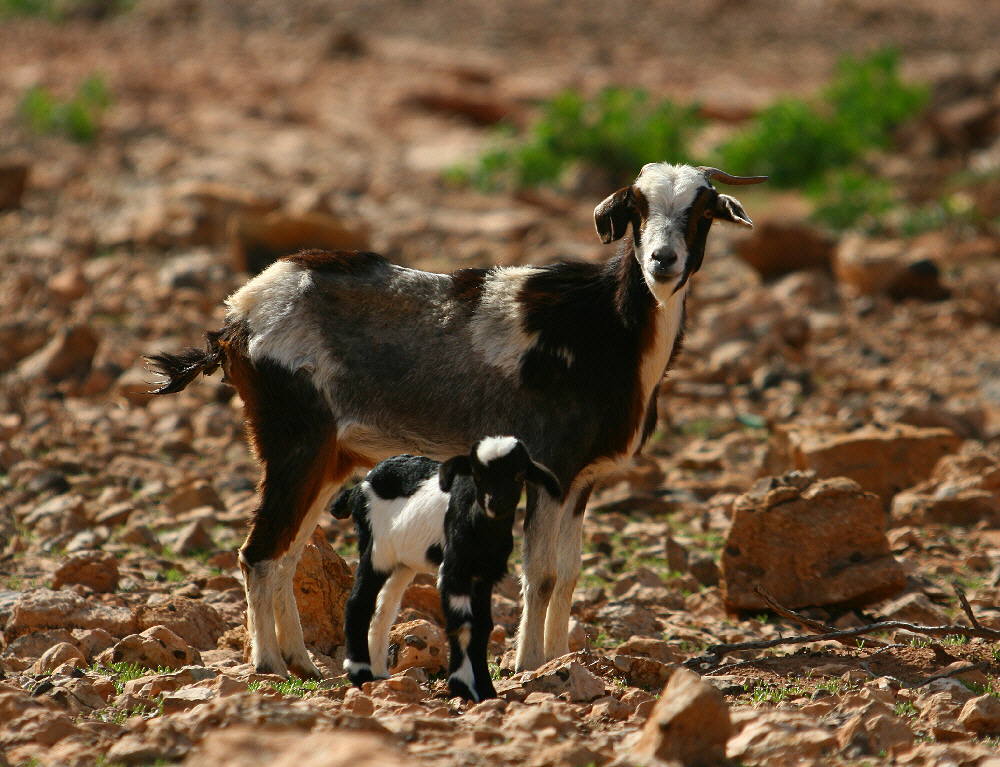 Die Fuerteziege ist das inoffizielle Wappentier der Insel